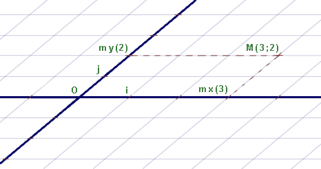 Repère non-orthonormé dans un plan en couleur.